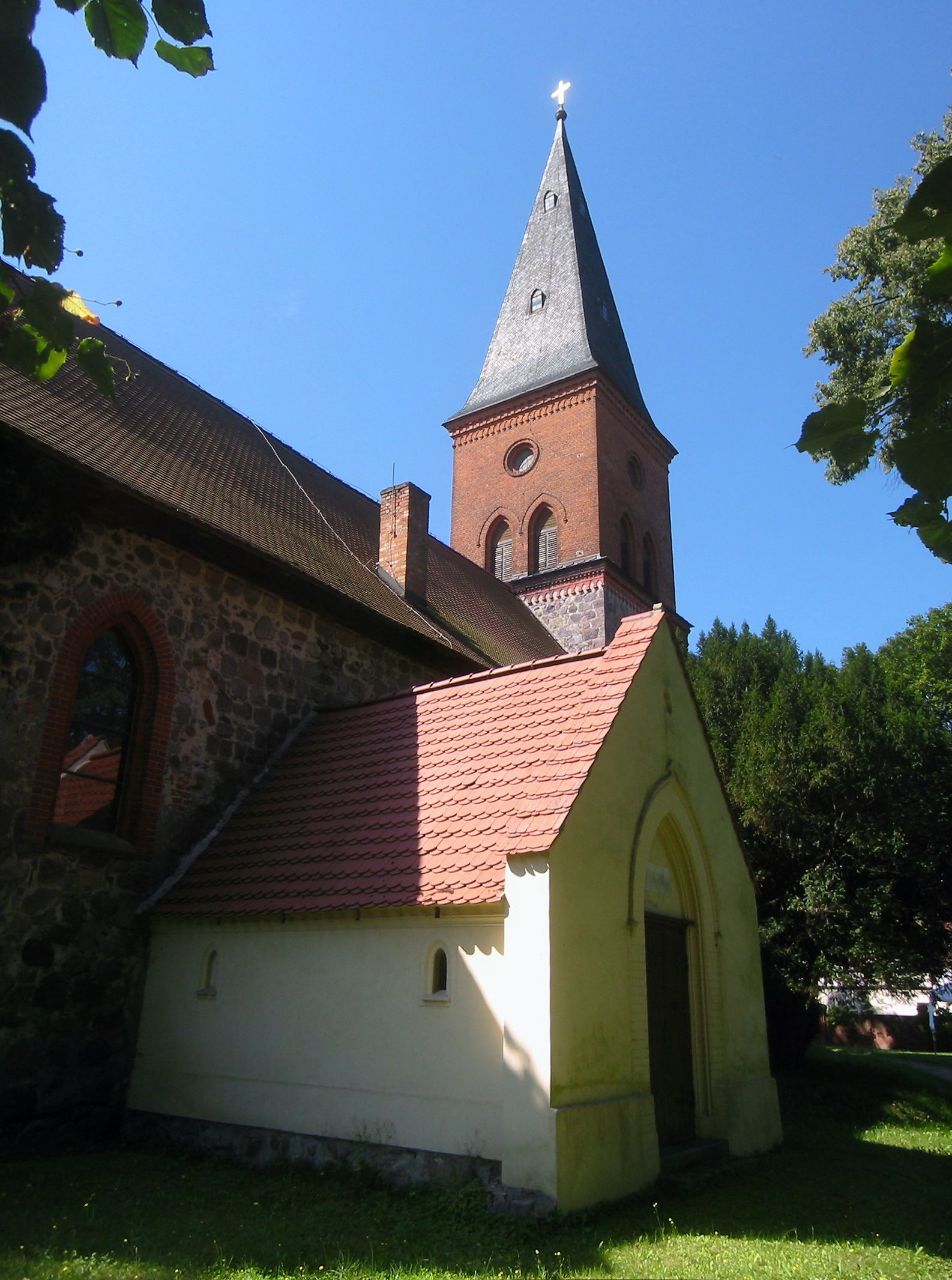 Nord-Ostansicht der Dorfkirche Ringenwalde aus dem 13. Jahrhundert, heute Gemeinde Temmen-Ringenwalde, Uckermark (Brandenburg)